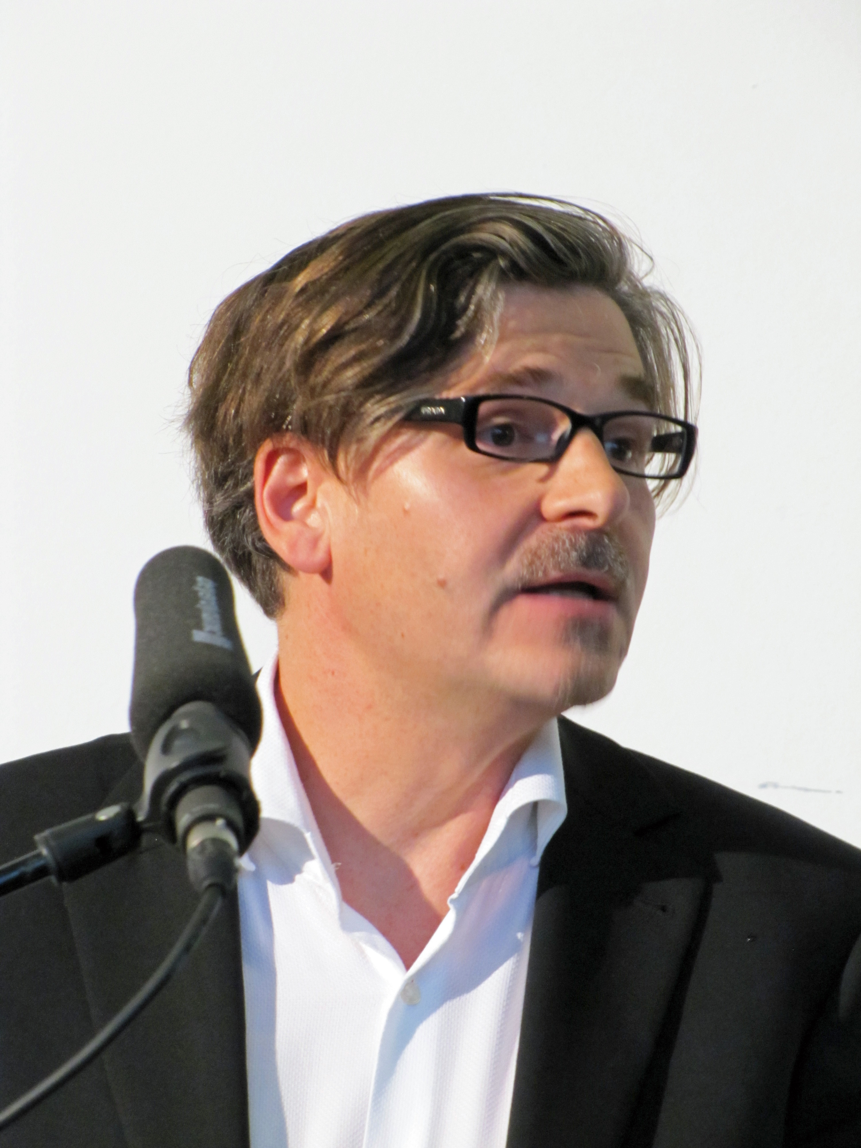 Jan-Werner Müller, deutscher Politikwissenschaftler, Dozent und Autor. Oktober 2013 in Frankfurt am Main bei den Römerberggesprächen.